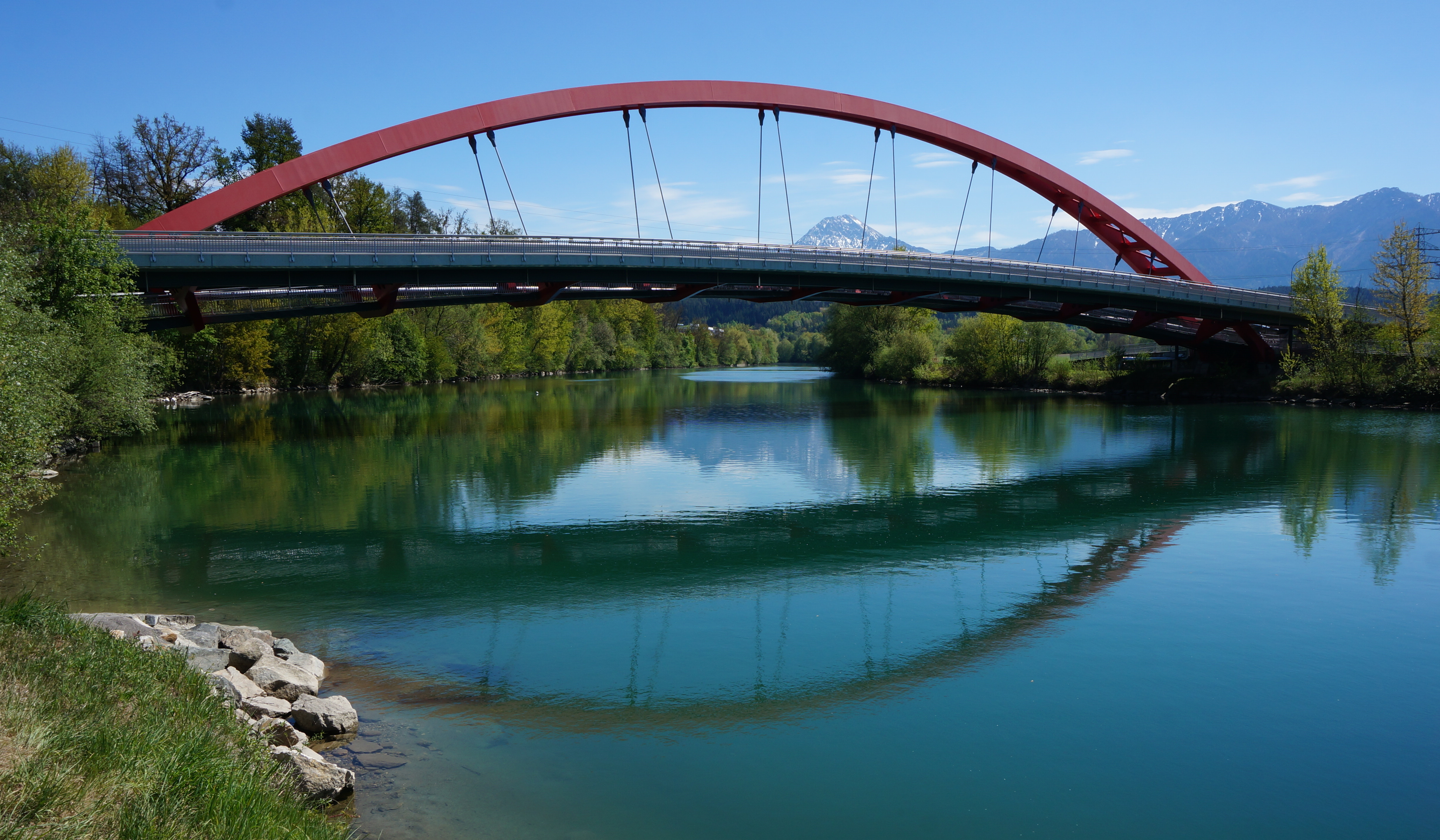 Die Friedensbrücke überquert die Drau und verbindet den Stadtteil St. Magdalen mit dem Stadtteil Perau in Villach . Die Friedensbrücke, eine Stahlbrücke, hat eine Länge von 125 Metern und ihre Bogentragkonstruktion wiegt 600 Tonnen, die gesamte Brücke wiegt rund 3000 Tonnen. Die Fahrbahnen sind voneinander getrennt und verlaufen rechts und links der Bögen, jedoch sind die Rad- und der Fußgängerwege miteinander verbunden. Die Brücke wurde im Zuge der Umfahrungstrasse GAV (Gewerbe Aufschließungstrasse Villach) errichtet und verbindet die Stadtteile St. Magdalen und St. Agathen über den Drau Fluss. Die Friedensbrücke in Villach, wird im Sommer mehrmals täglich vom Drau Schiff MS Landskron passiert. Außerdem legt das Schiff unmittelbar an der Brücke an. Am 15. Dezember 2004 wurde die Friedensbrücke „Rote Brücke“ für den Verkehr freigegeben.